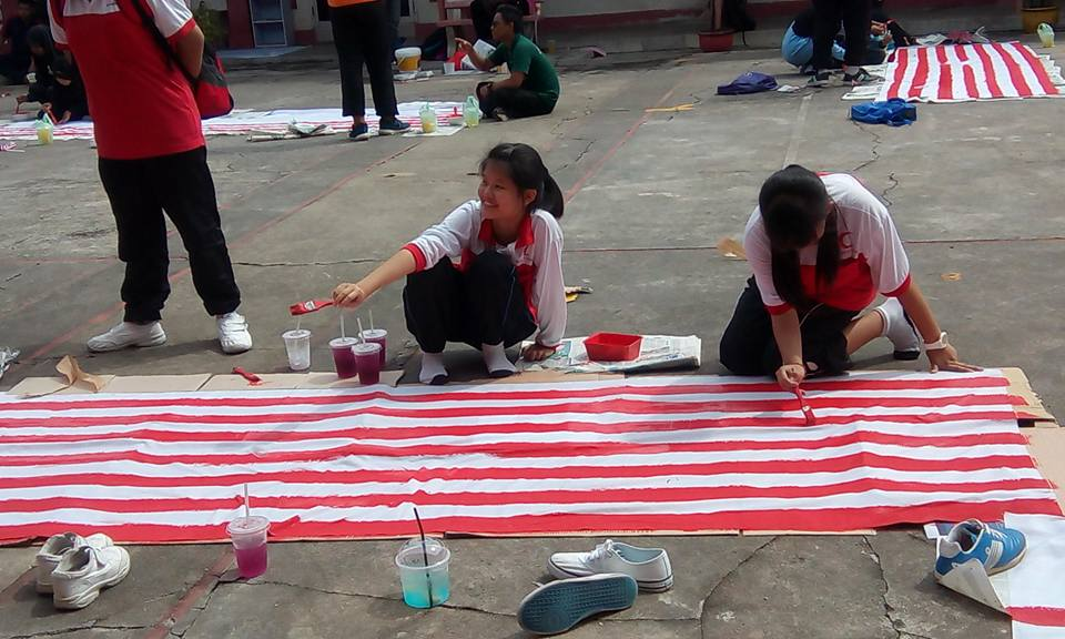 Mewarna Jalur Gemilang